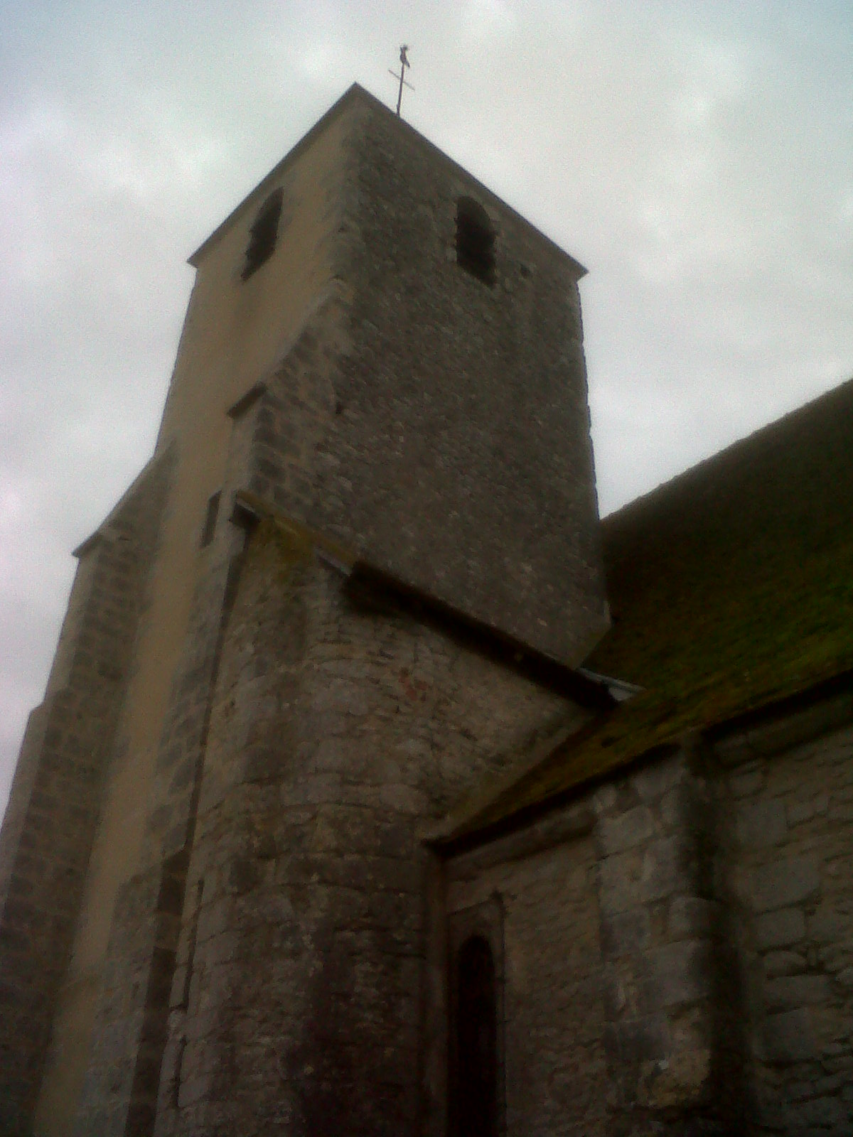 Eglise de Montcresson vue depuis la rue voisine : Rue de l'église